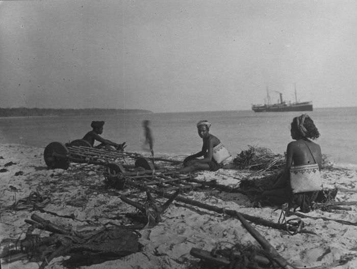 Foto. Verzamelen en transport van zeewier op het strand bij Waikelo (West-Soemba), met een schip op de rede